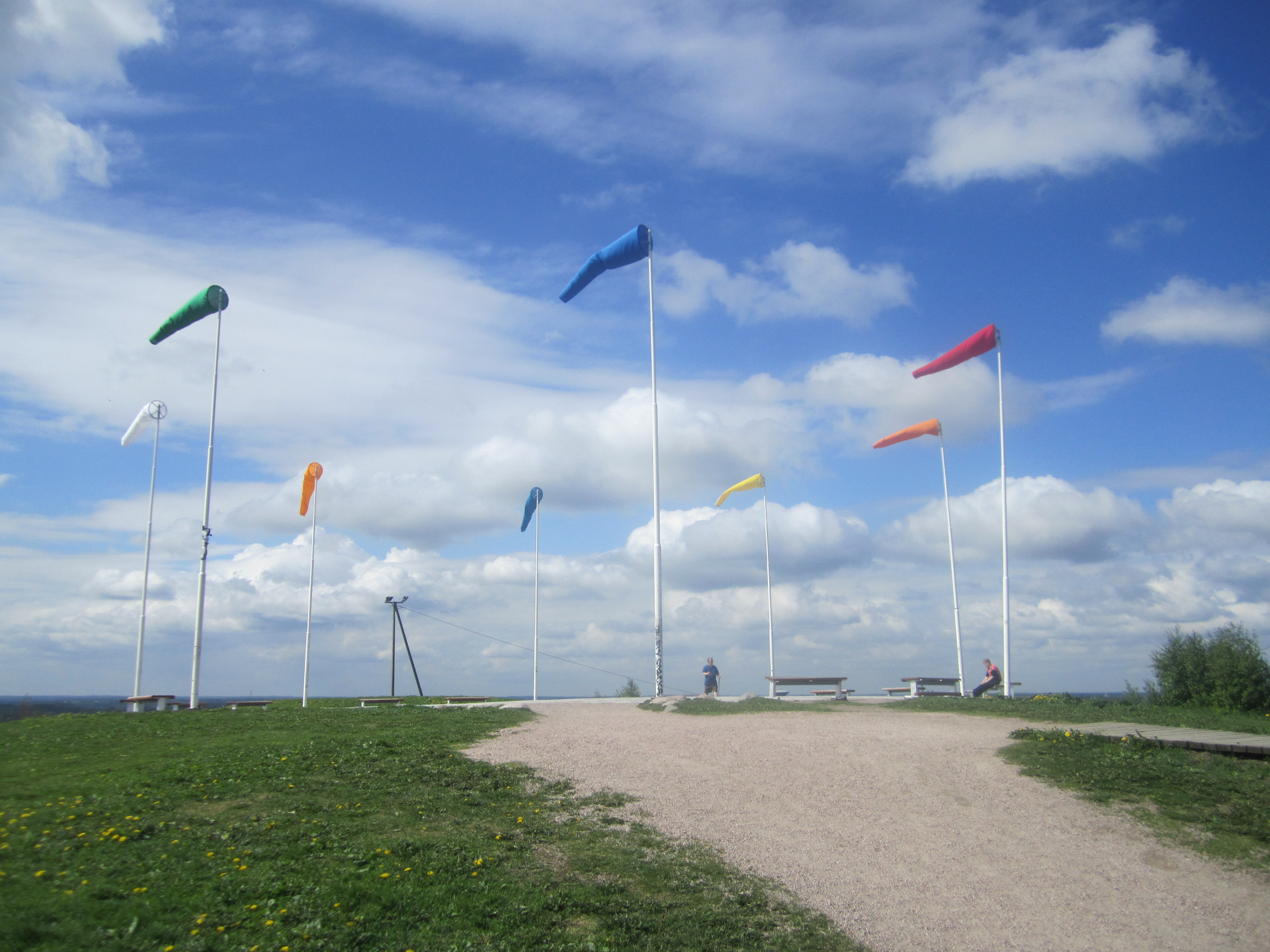 Kesäkuva jättäriltä 2013.